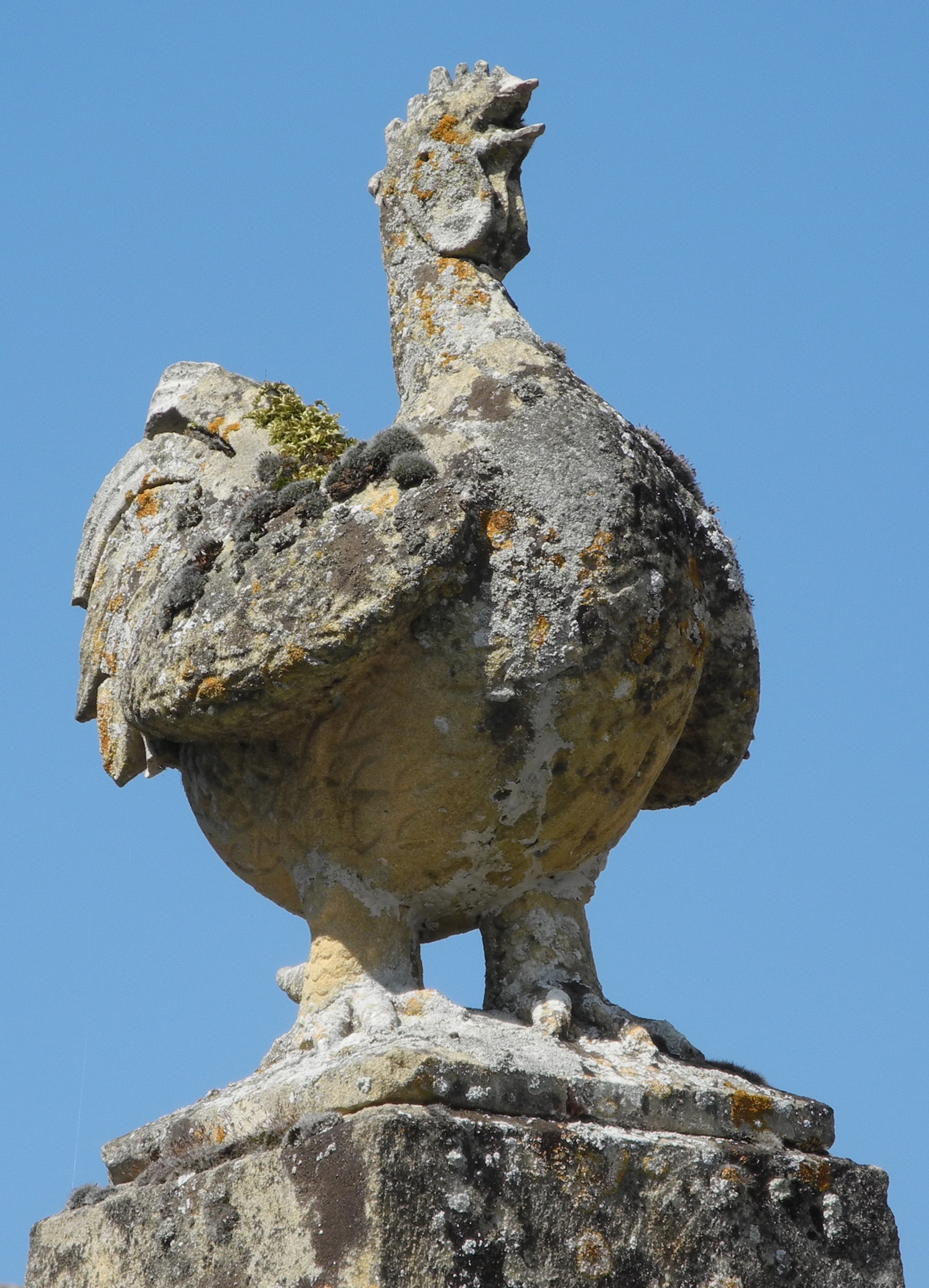 Sculpture d'un coq pacifique au sommet de l'obélisque du monument aux morts de Sireuil (Dordogne)